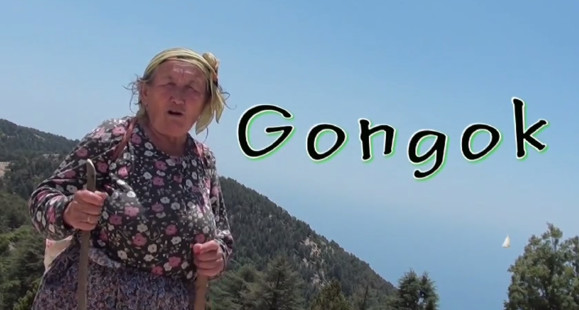 Gongok Belgeseli